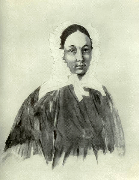 Мария Казимировна Юшневская ур. Кругликовская (1790-1863)- жена декабриста.